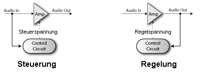 Prinzipieller Unterschied Steuerung (feed forward) und Regelung (feed back)